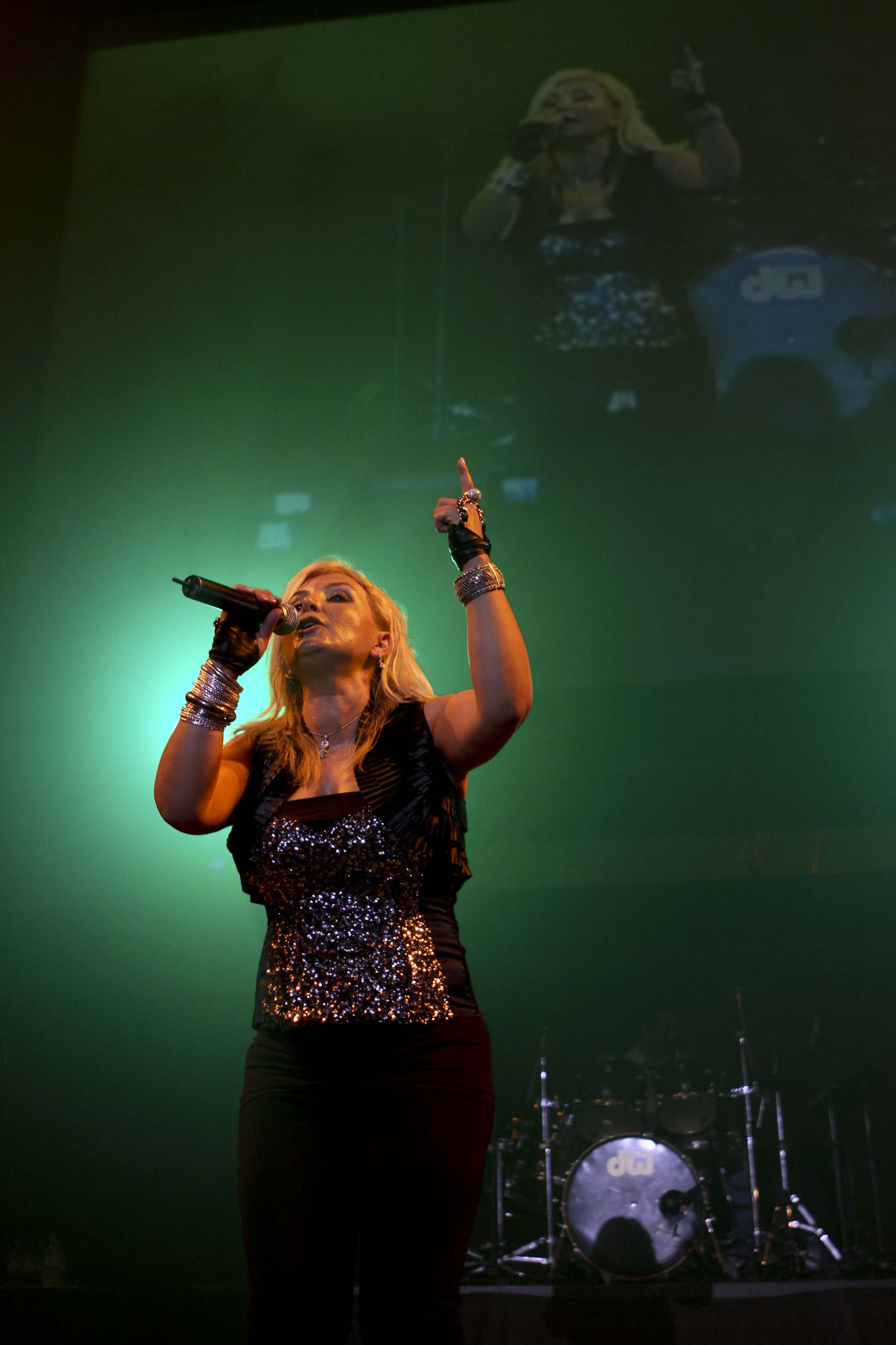 Shahram Shahpareh and Hangameh Kuala Lumpur Malaysia concert photos